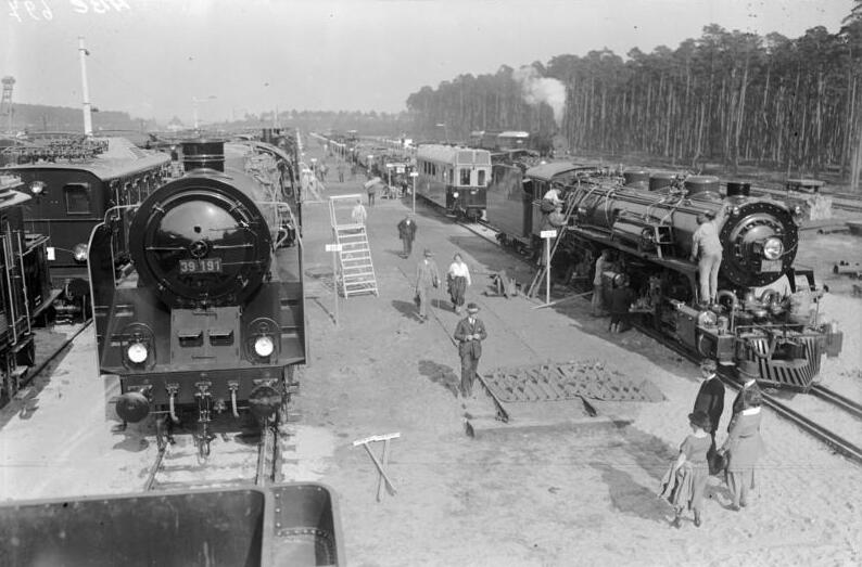 Von der großen Eisenbahntechnischen Ausstellung in Seddin b./Berlin, in welcher an über 100 modernster Lokomotiven und die modernsten technischen Einrichtungen gezeigt werden. Blick auf das riesige Ausstellungsgelände mit seinen über 100 Lokomotiven.